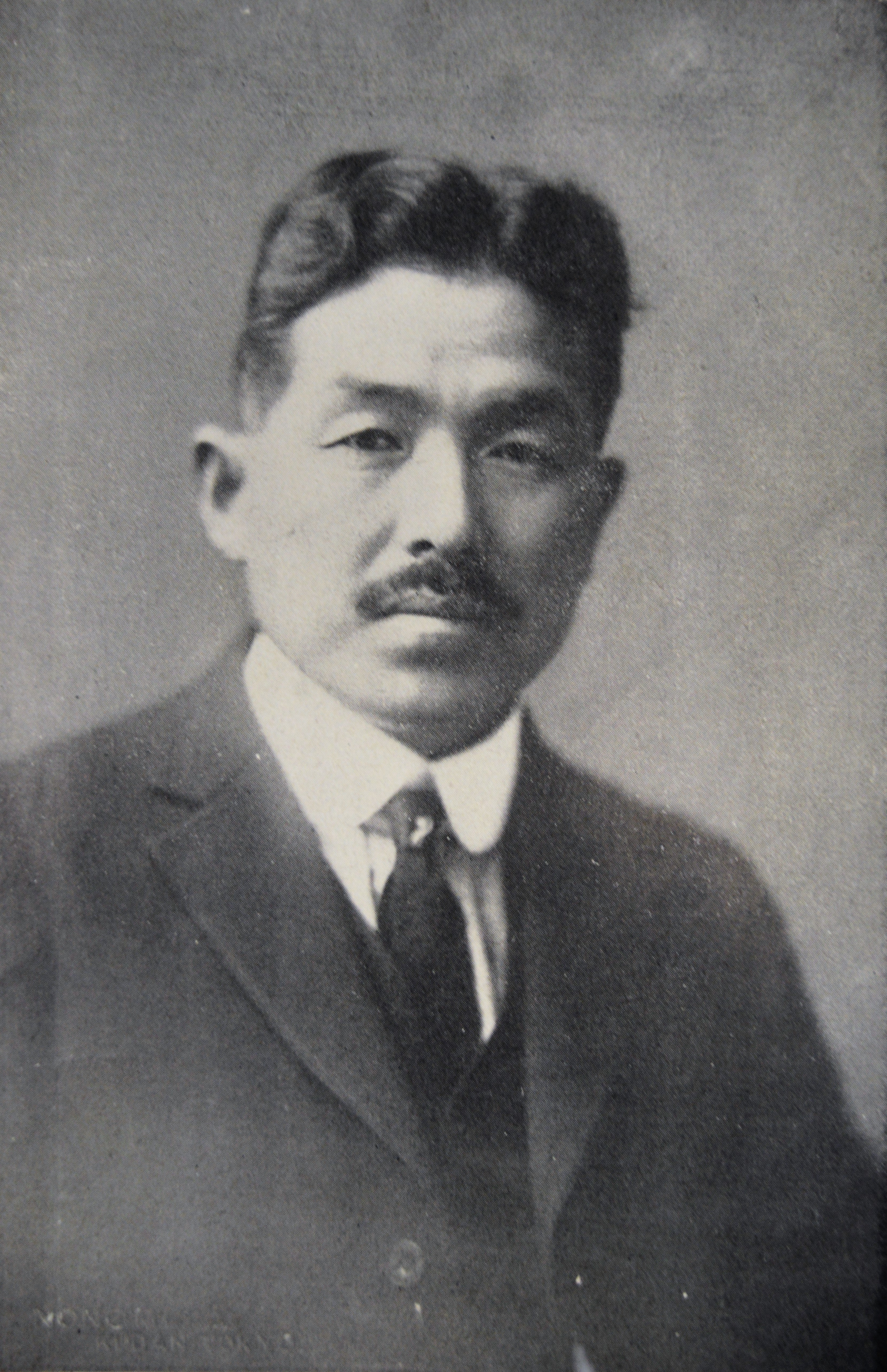 建築家の中村與資平。